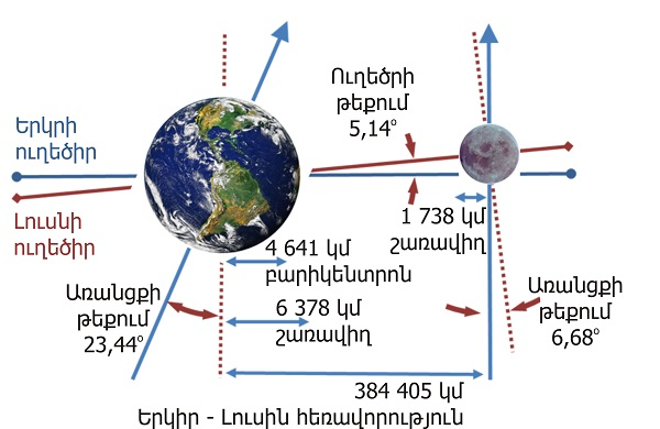 Երկիր Լուսին համակարգի տվյալները